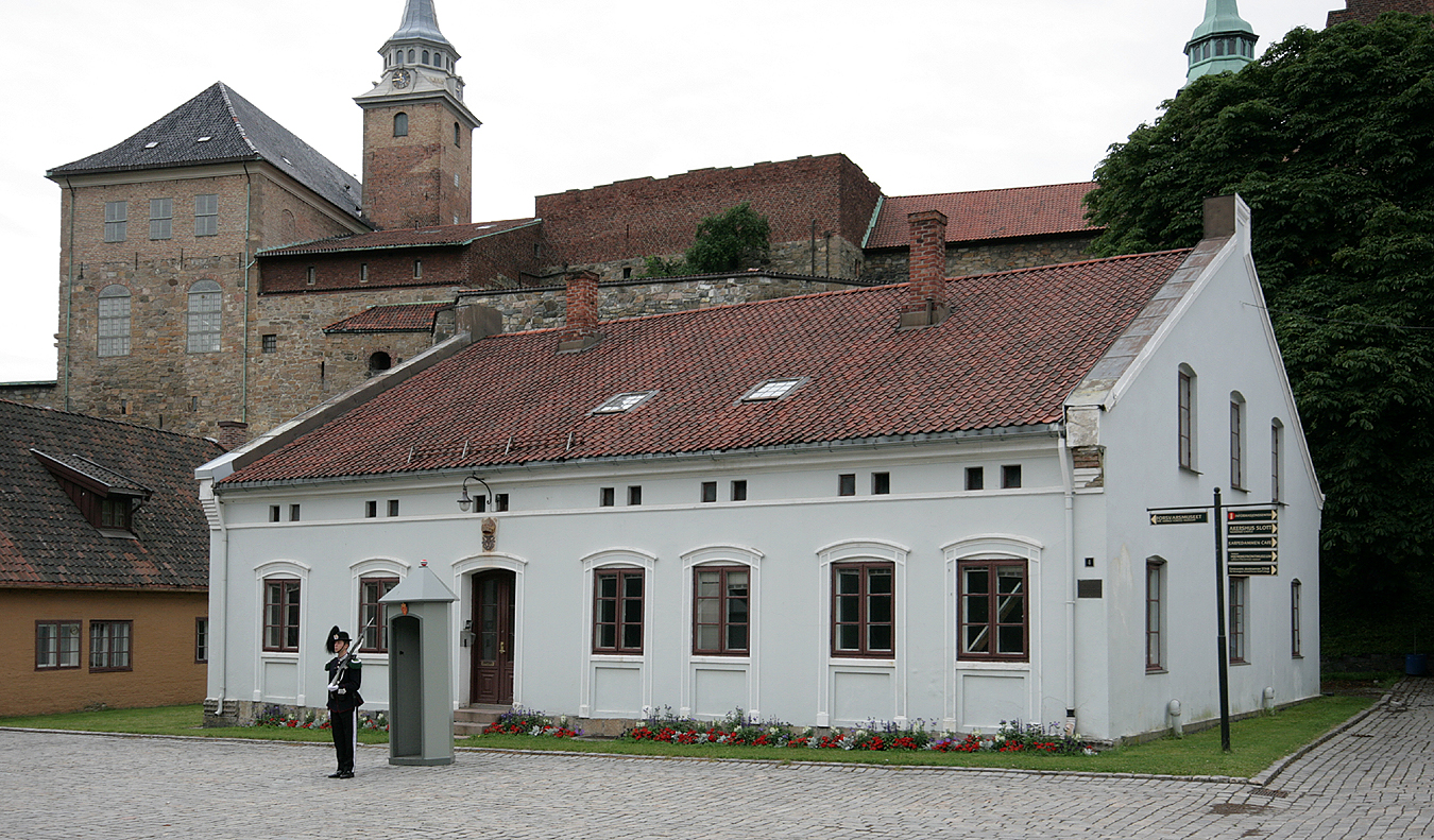 Hovedvakta, Akershus festning, Oslo. Bygd 1724. Ombygd til nåværende utseende 1855.